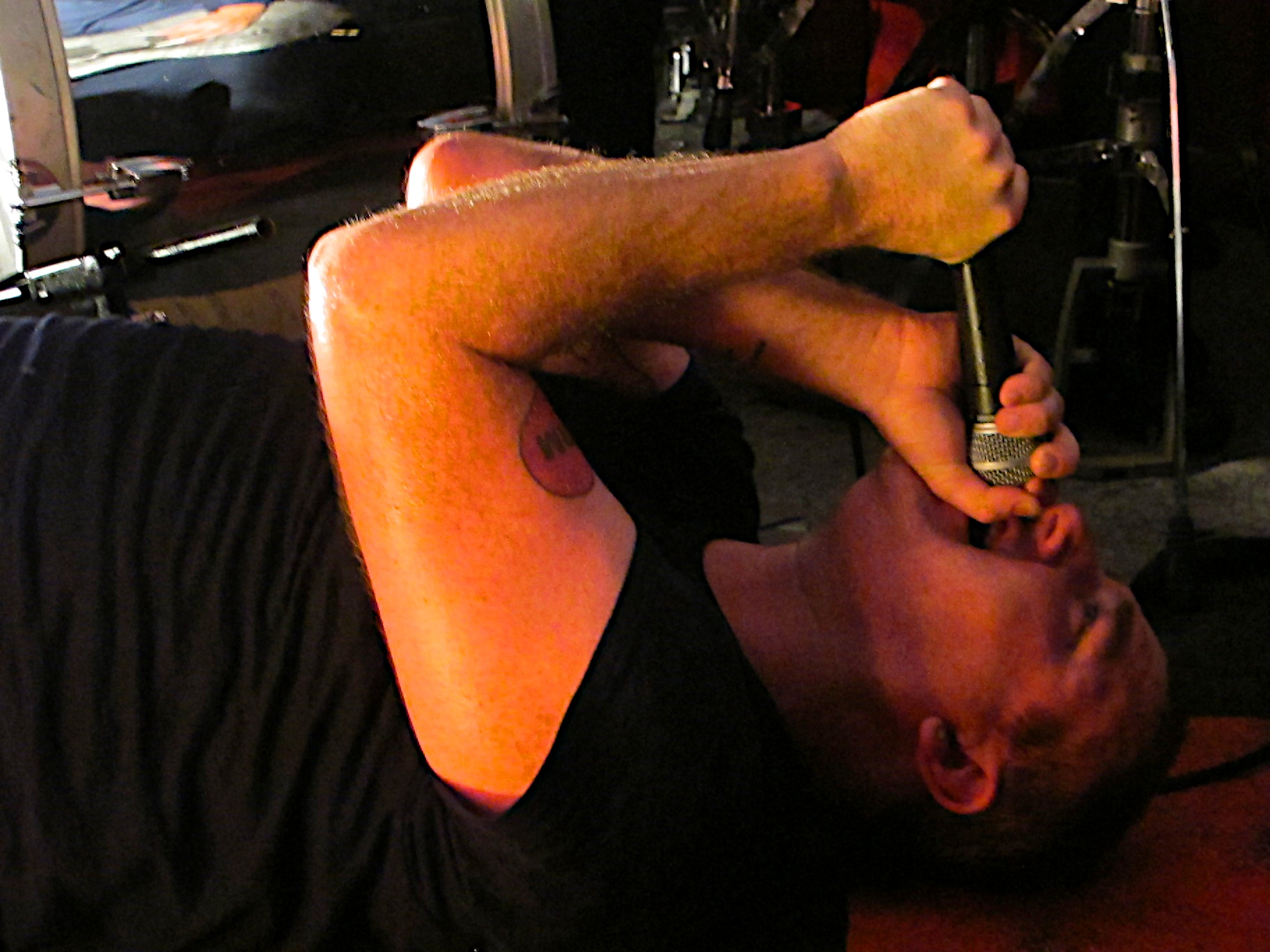 @ AS220